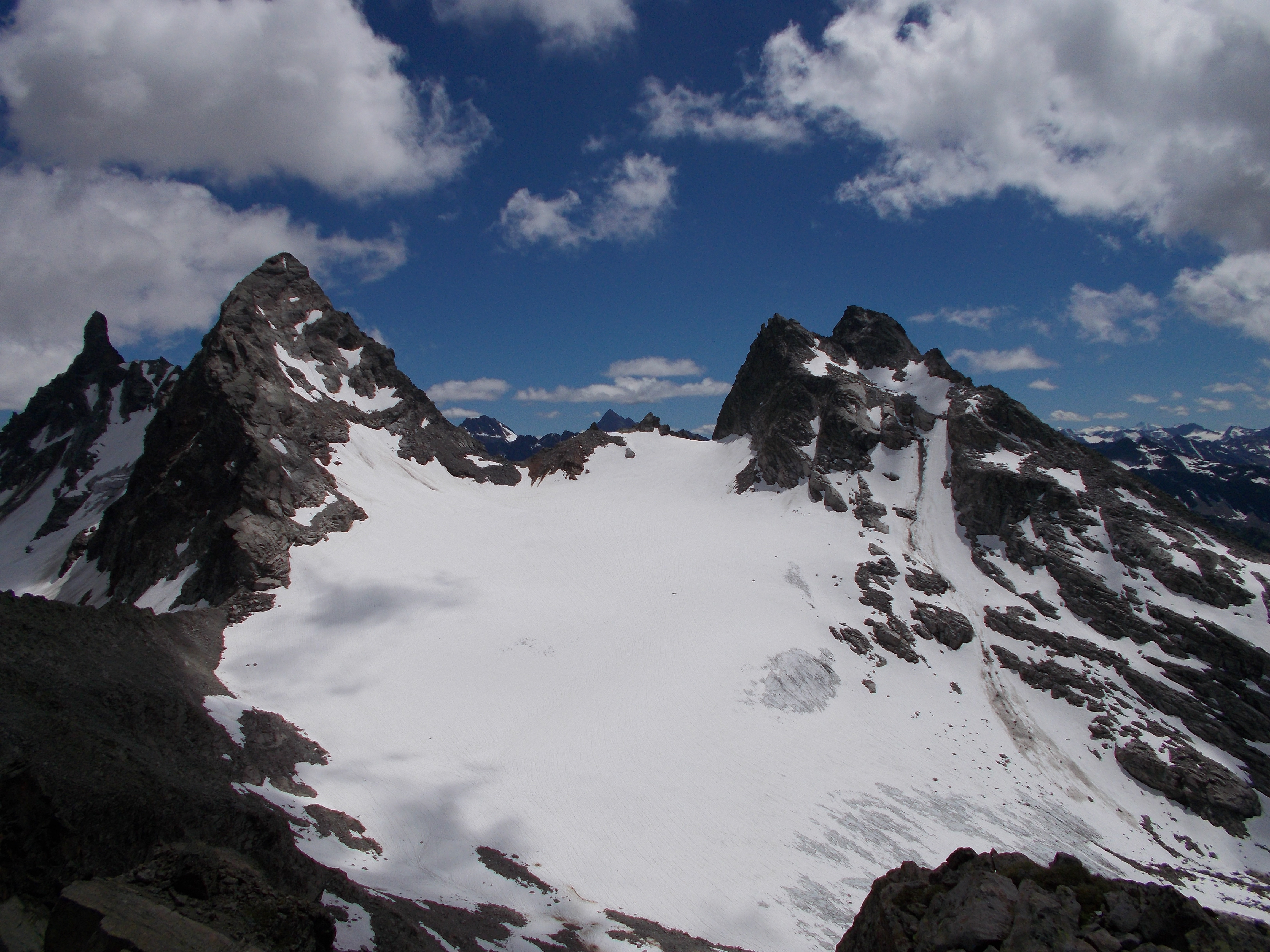 Großes und Kleines Seehorn